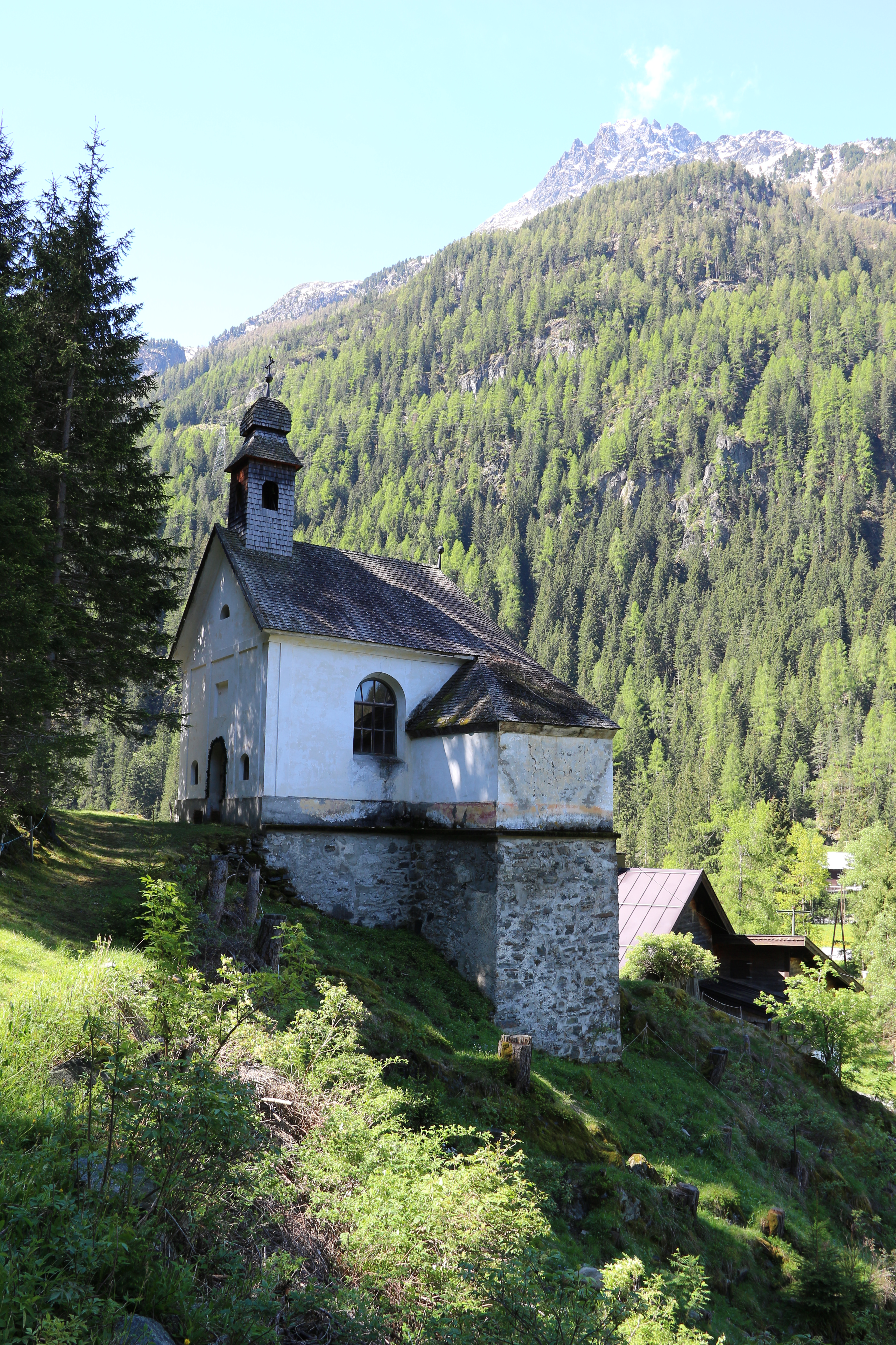 Ortskapelle Unser Herr im Elend in Bruggen, Gemeinde Längenfeld, Ötztal, Tirol.